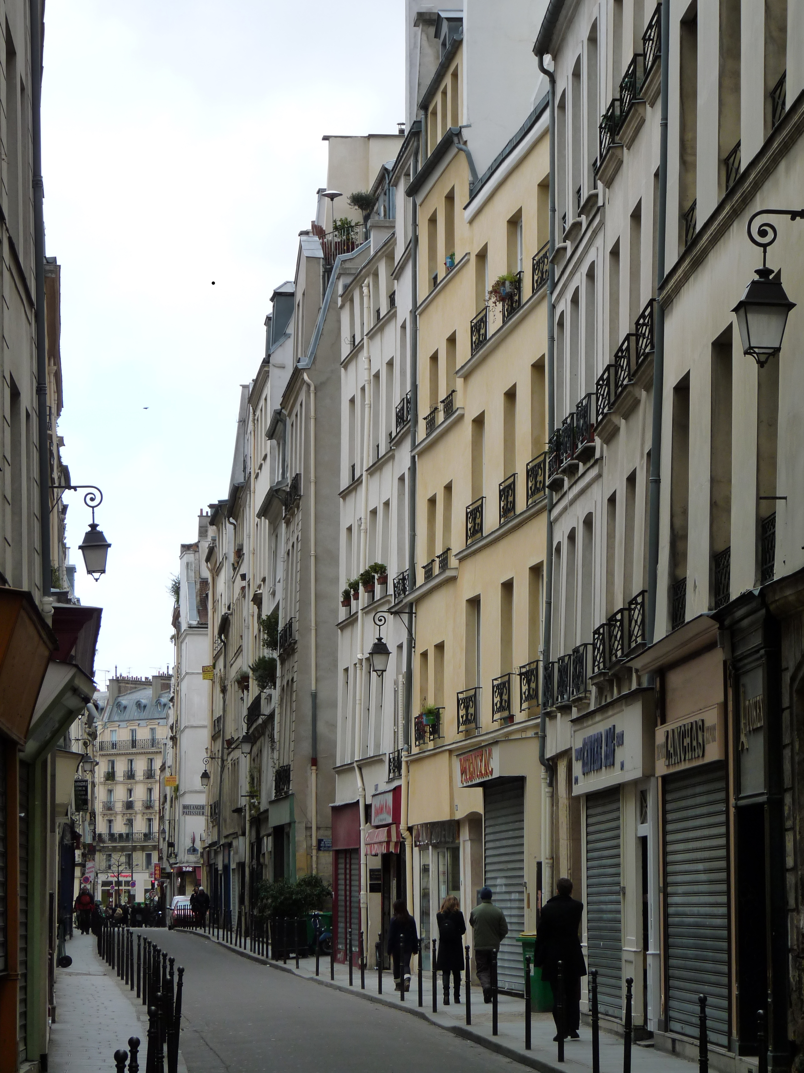 La rue des Gravilliers à Paris, vue depuis la rue des Vertus